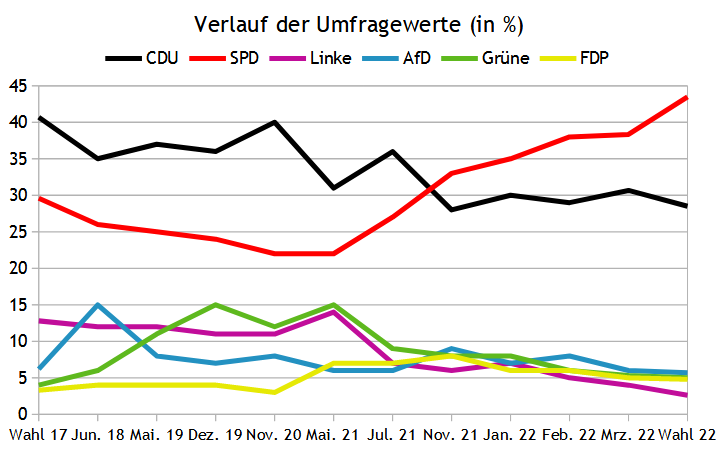 Umfragen zur Saarlandwahl 2022